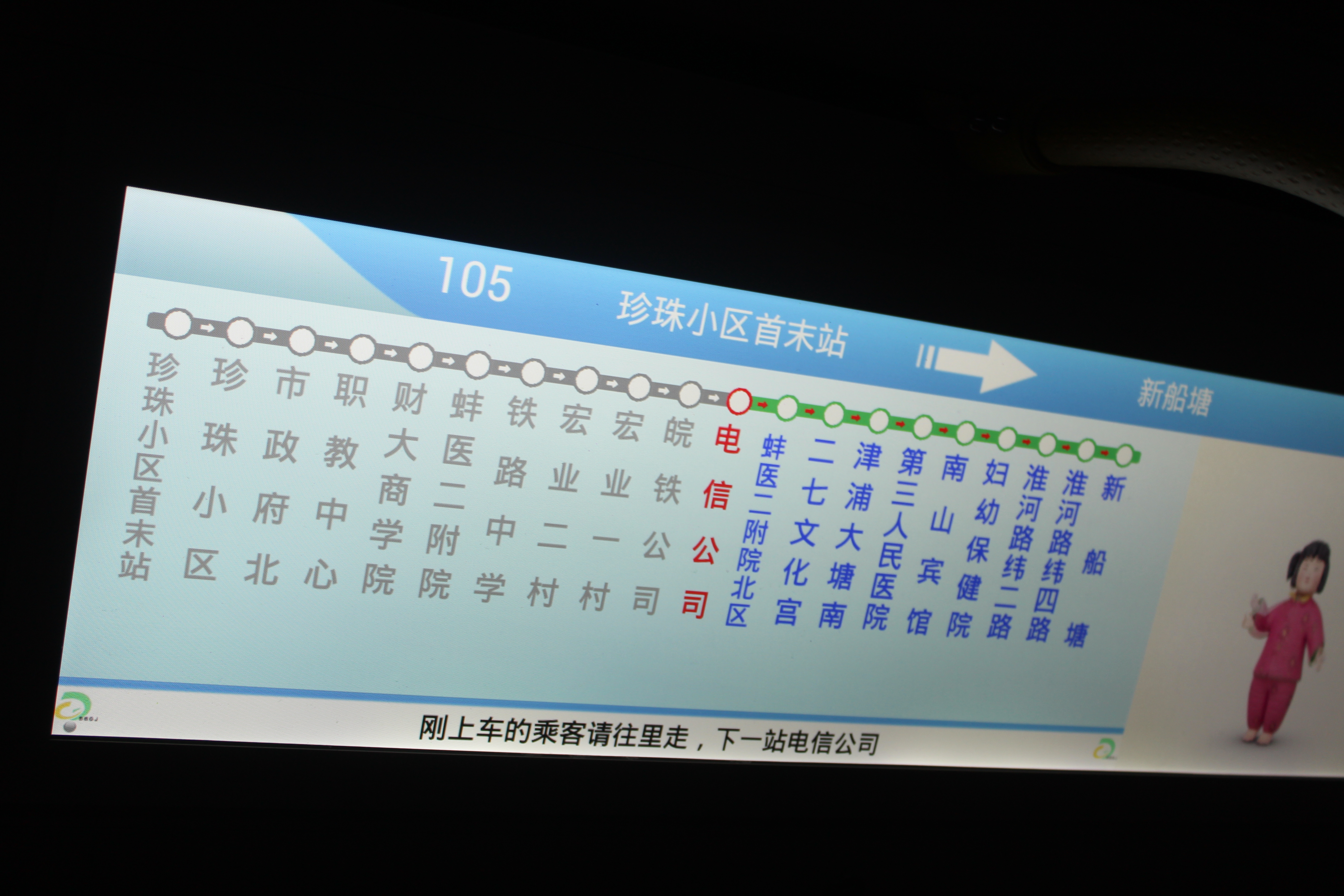 中文（中国大陆）: Bengbu Bus No.105 LED Plate